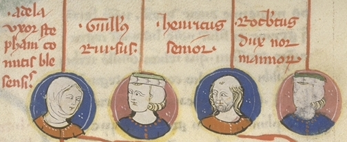 Toulouse, Bibliothèque municipale MS 450: Bernard Gui, De origine prima Francorum f 190r